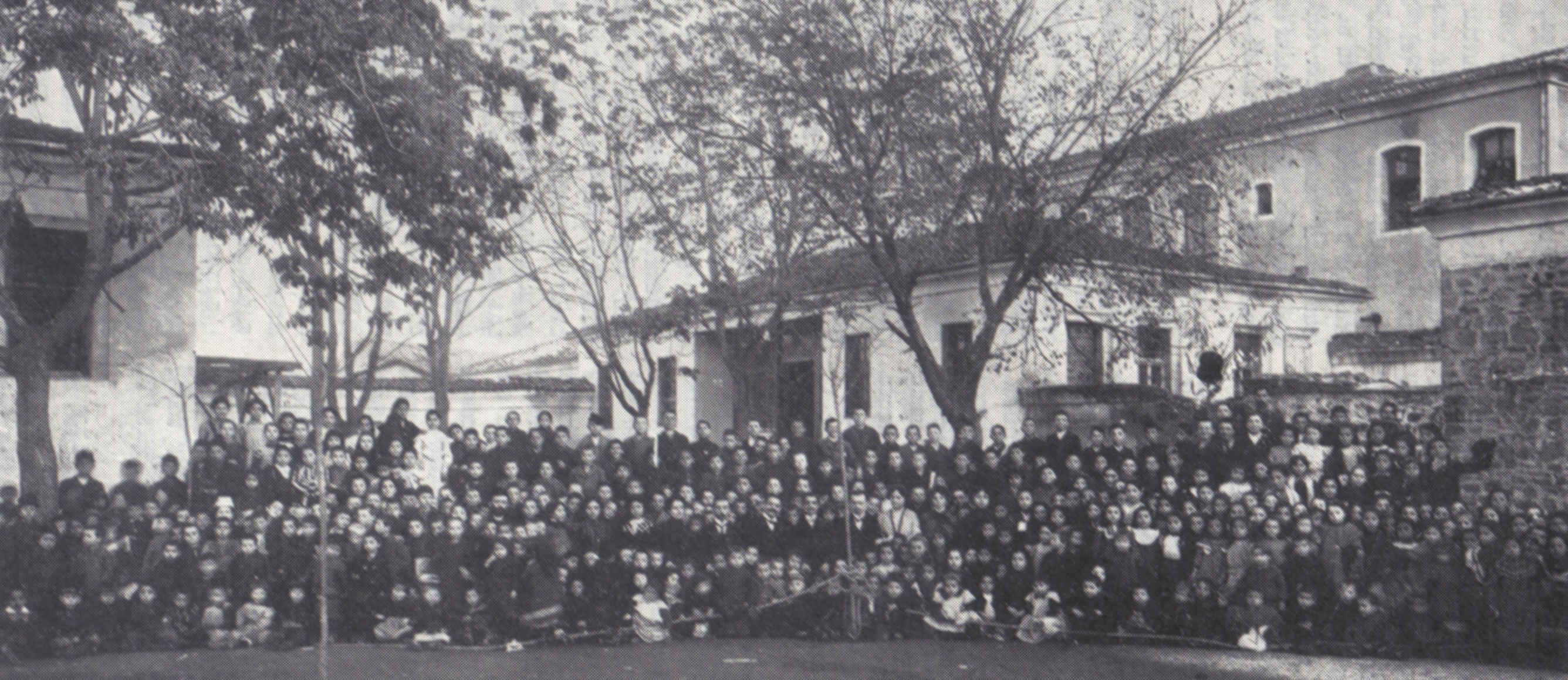 בית הספר היסודי היהודי בפלובדיב